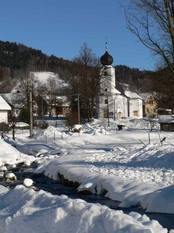 Vernířovice, u Merty pod kostelem.